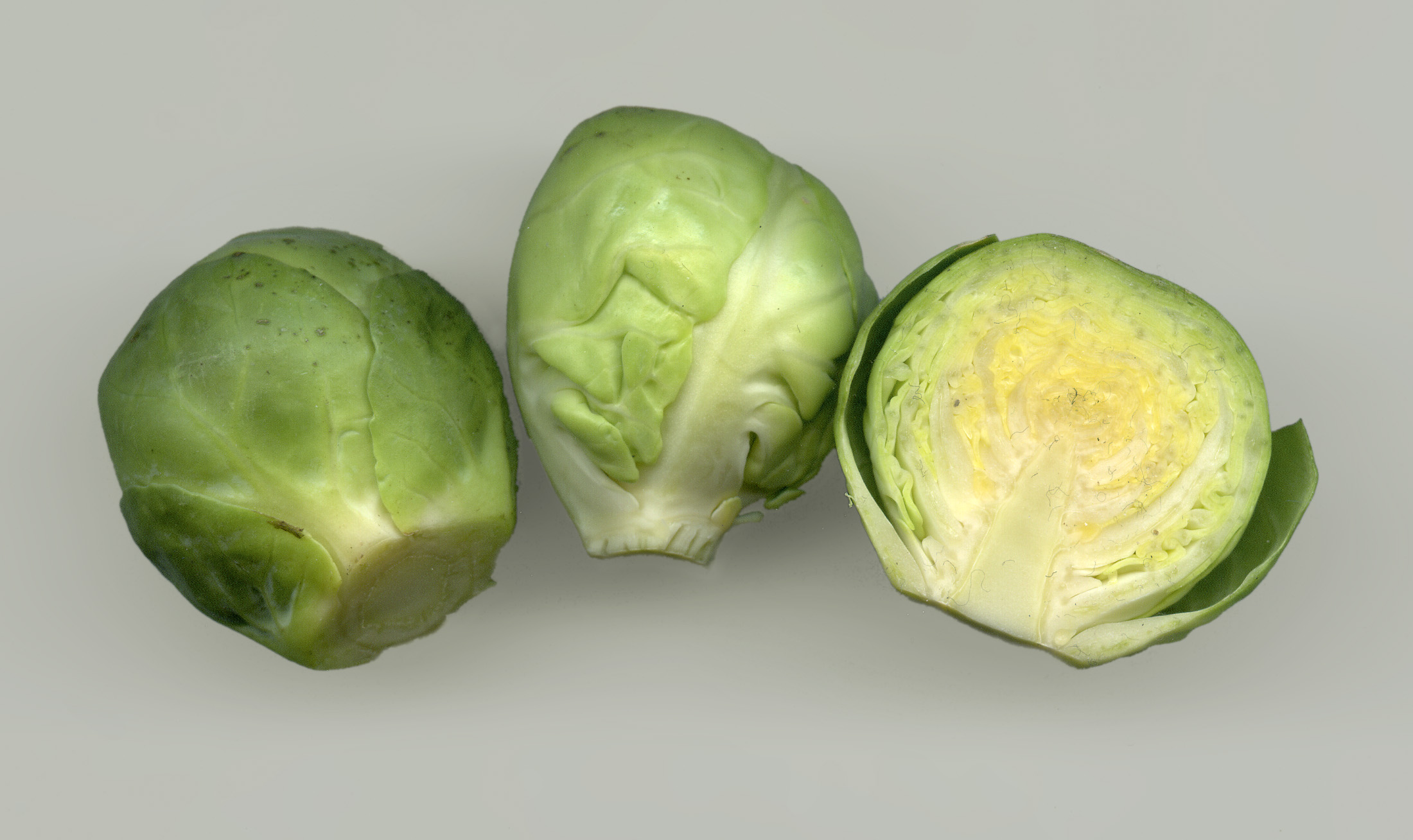 Rosenkohl